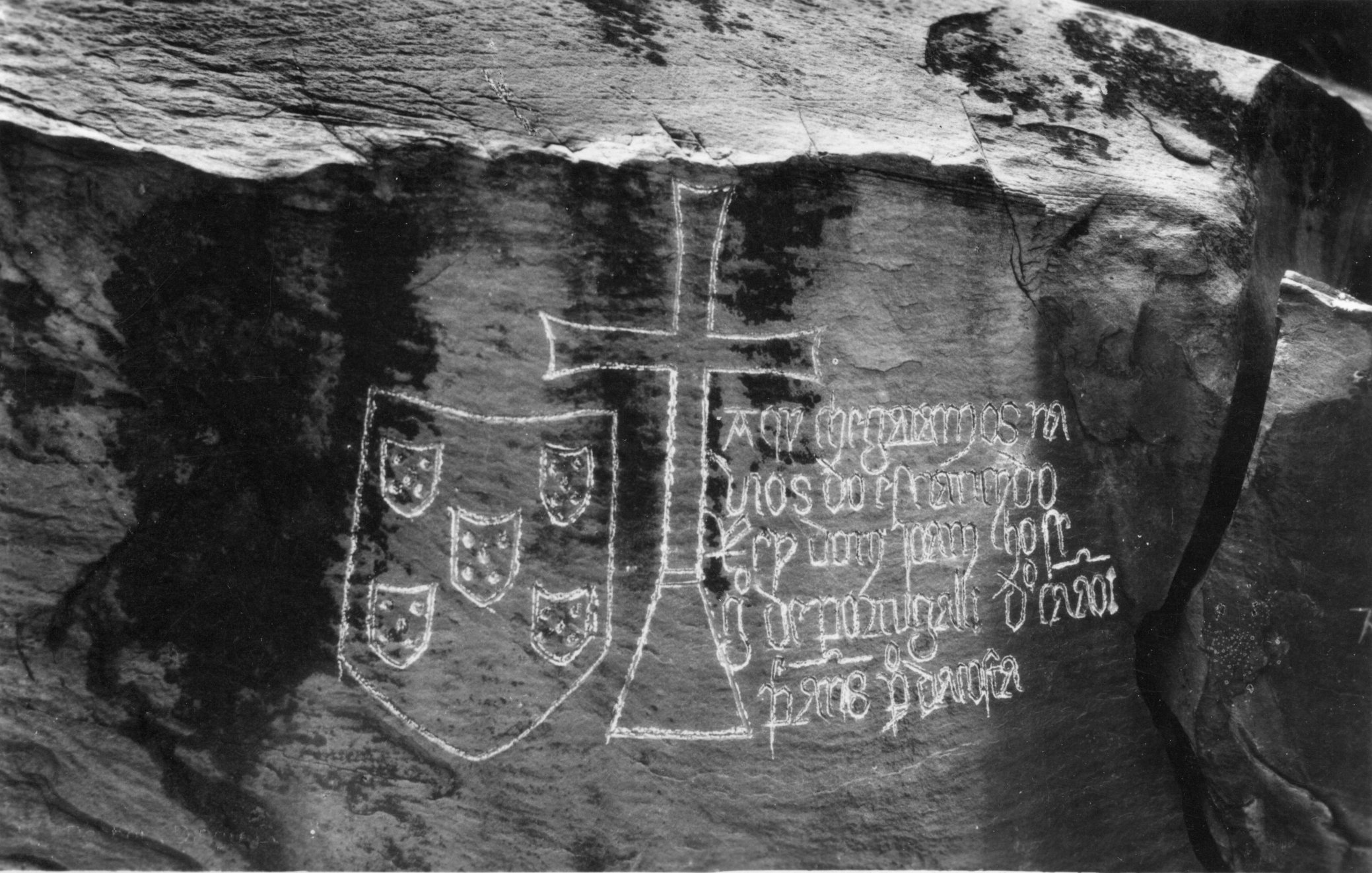 iscription de Diogo Cão sur la pierre de Ielala, à Matadi, sur le Zaïre ou Congo